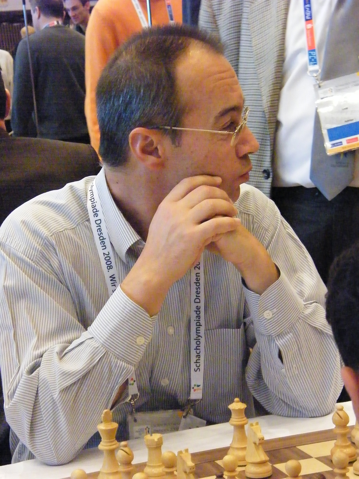 Predrag Nikolic bei der 38. Schacholympiade in Dresden 2008